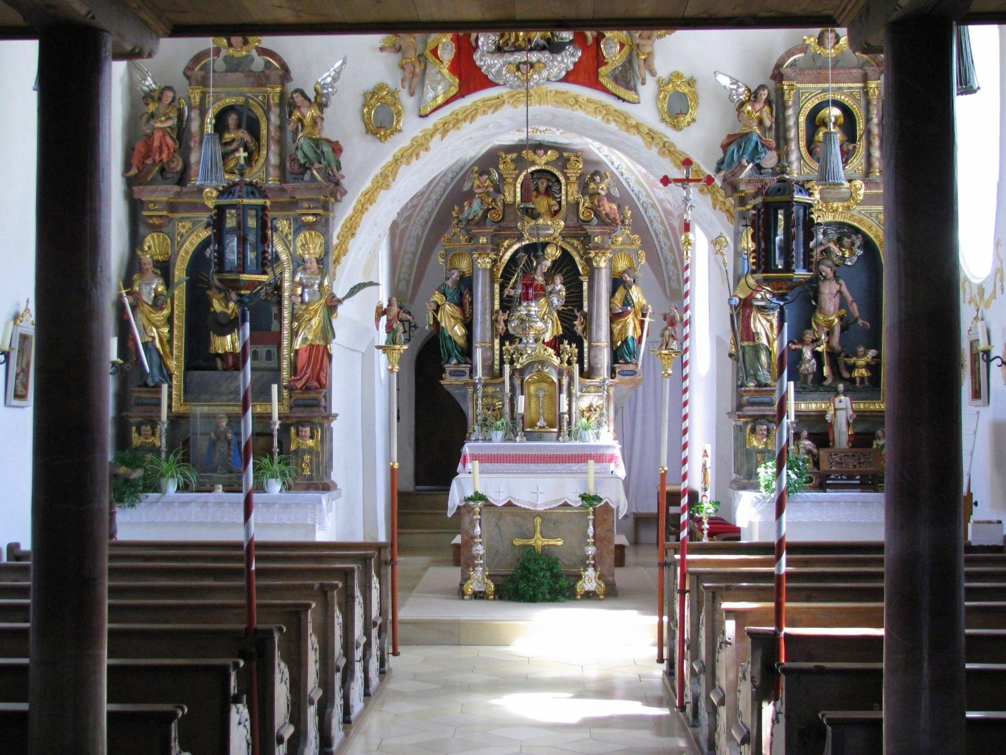 Filialkirche St. Peter und Paul in Tünzhausen, Landkreis Freising, Innenraum